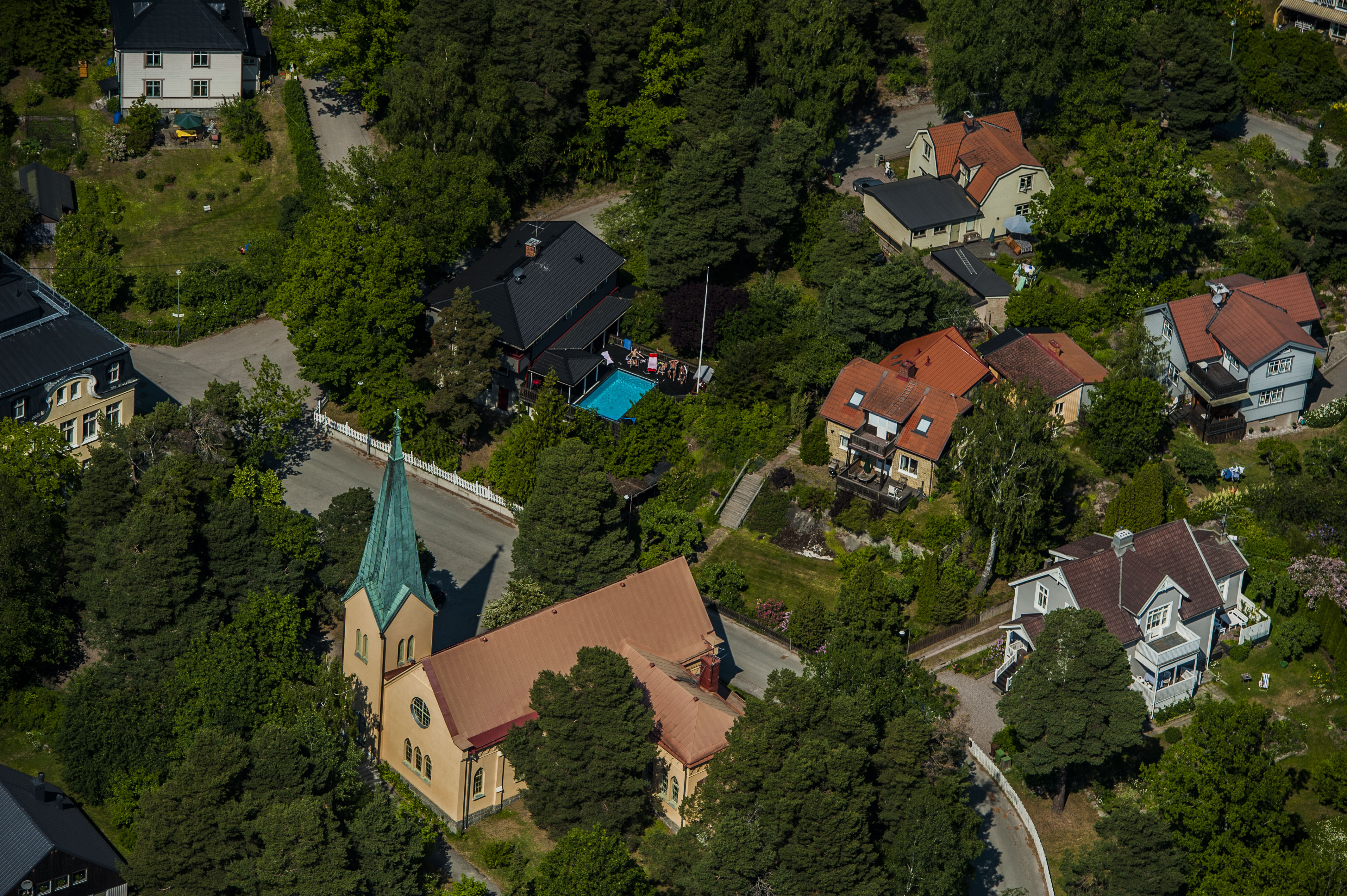 Duvbo ka